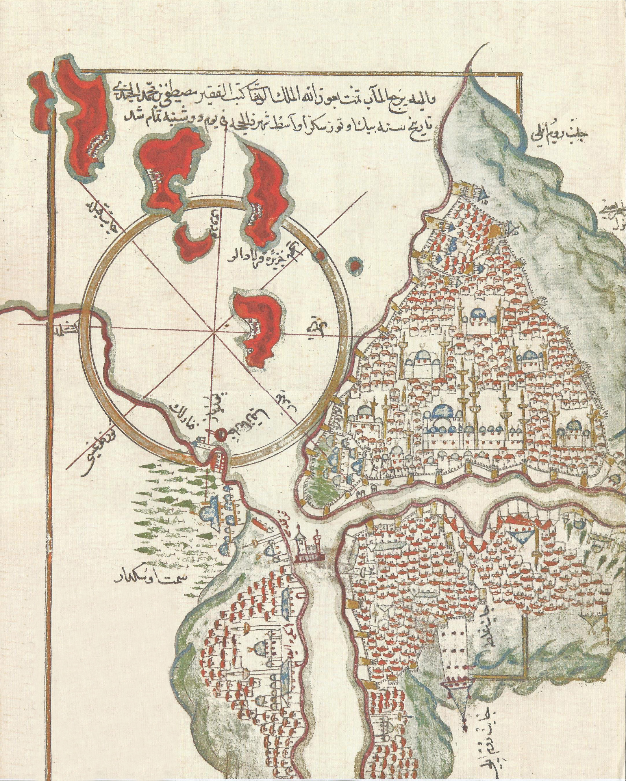 Pîrî Reis'in Kitab-ı Bahriye'sinin 1629 tarihli nüshasında bulunan İstanbul haritası. Pîrî Reis'in 1526 tarihli orijinal Kitab-ı Bahriye'sindeki İstanbul çizimi kayıptır. 103 yıl sonra Mustafa bin Mehmed Cündî tarafından Kitab-ı Bahriye'ye eklenen bu İstanbul çizimi Nuruosmaniye Kütüphanesi'nde bulunmaktadır.